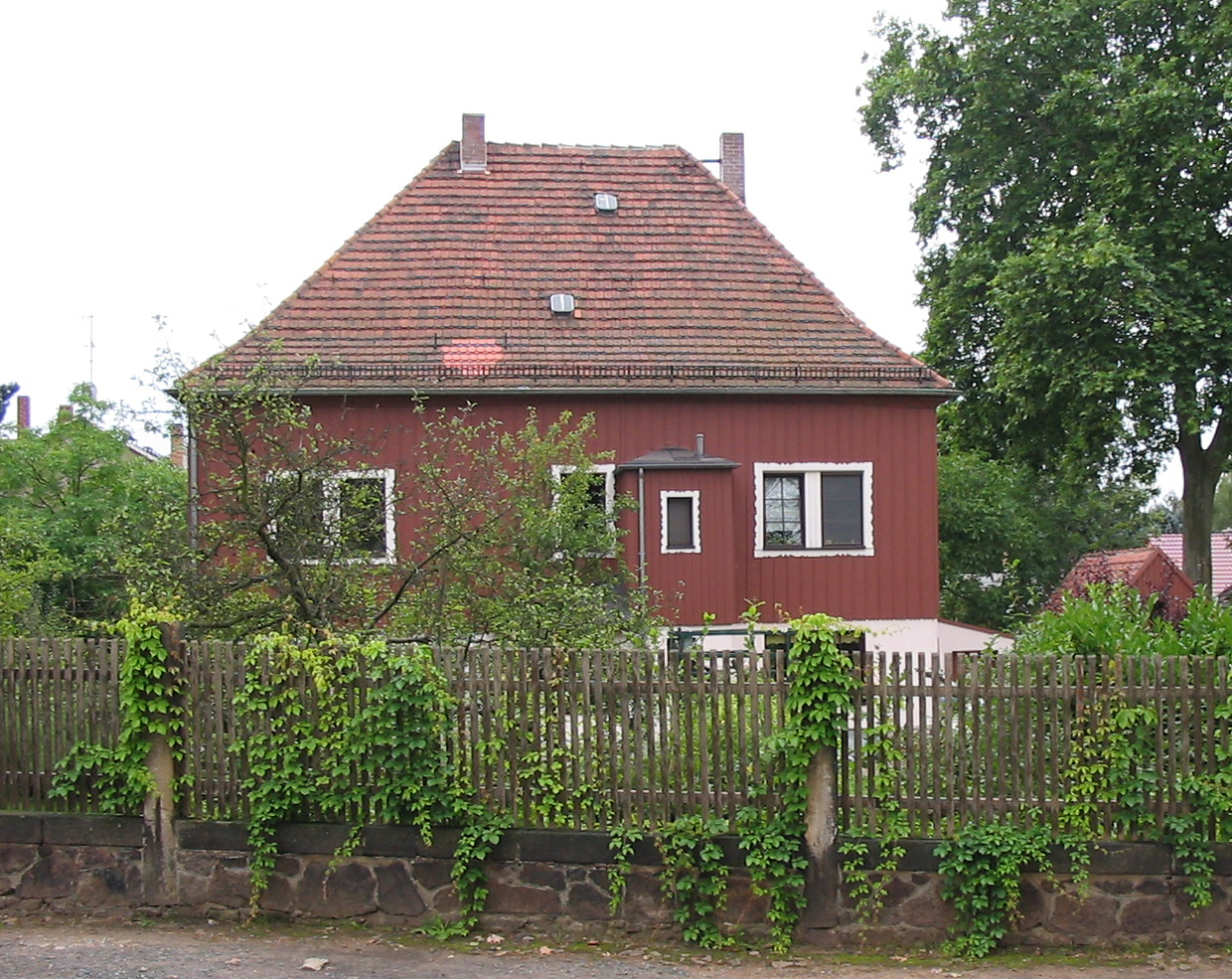 Haus Liborius, Radebeul